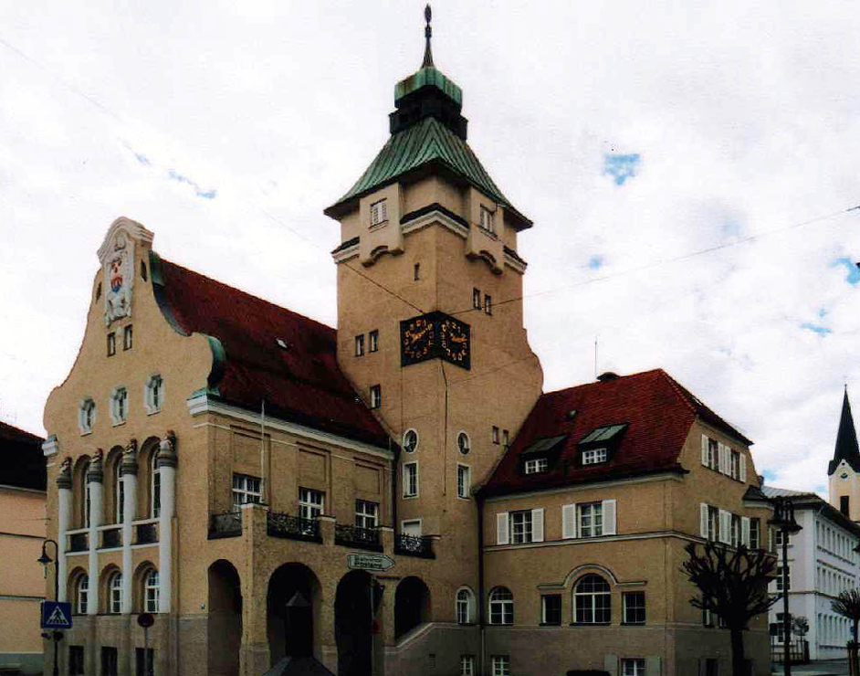 Simbach am Inn: Das Rathaus